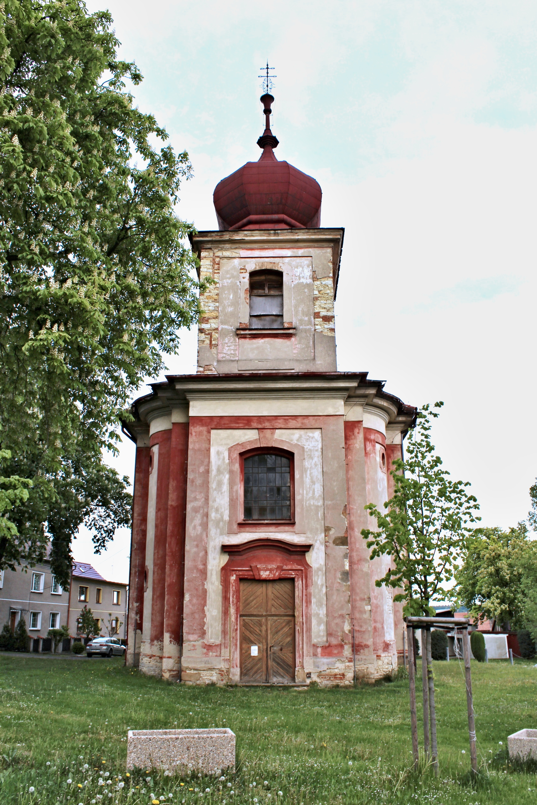 Třtice náves